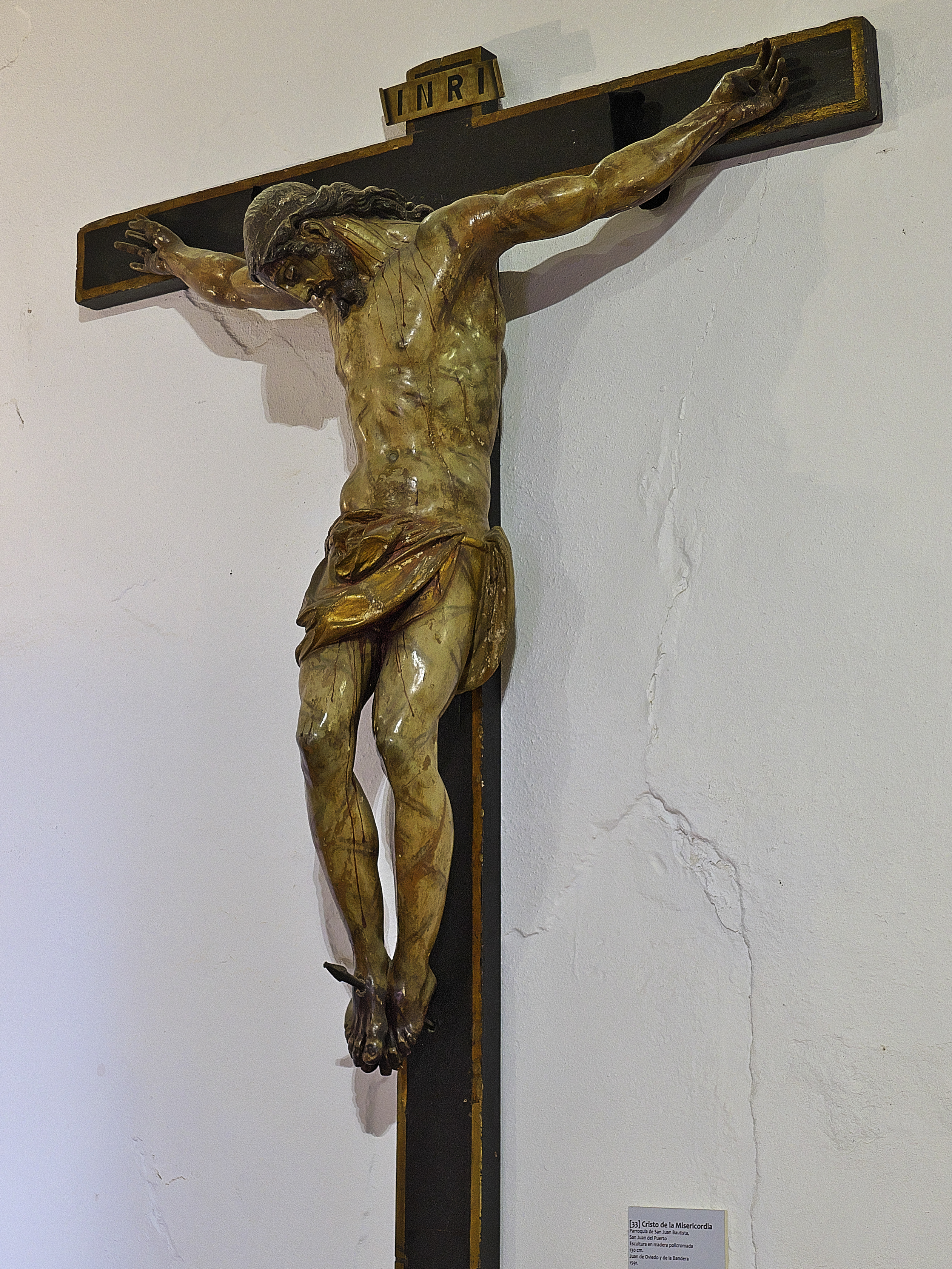 Iglesia de San Juan Bautista, San Juan del Puerto. Santa Teresa y el Carmelo en Tierras Onubenses, Monasterio de Santa Clara, Moguer (2015). Talla en madera policromada de Juan de Oviedo y de la Bandera (1591). Se observa la analogía con el Cristo del Mayor Dolor, titular de la Hermandad del Dulce Nombre (Sevilla).